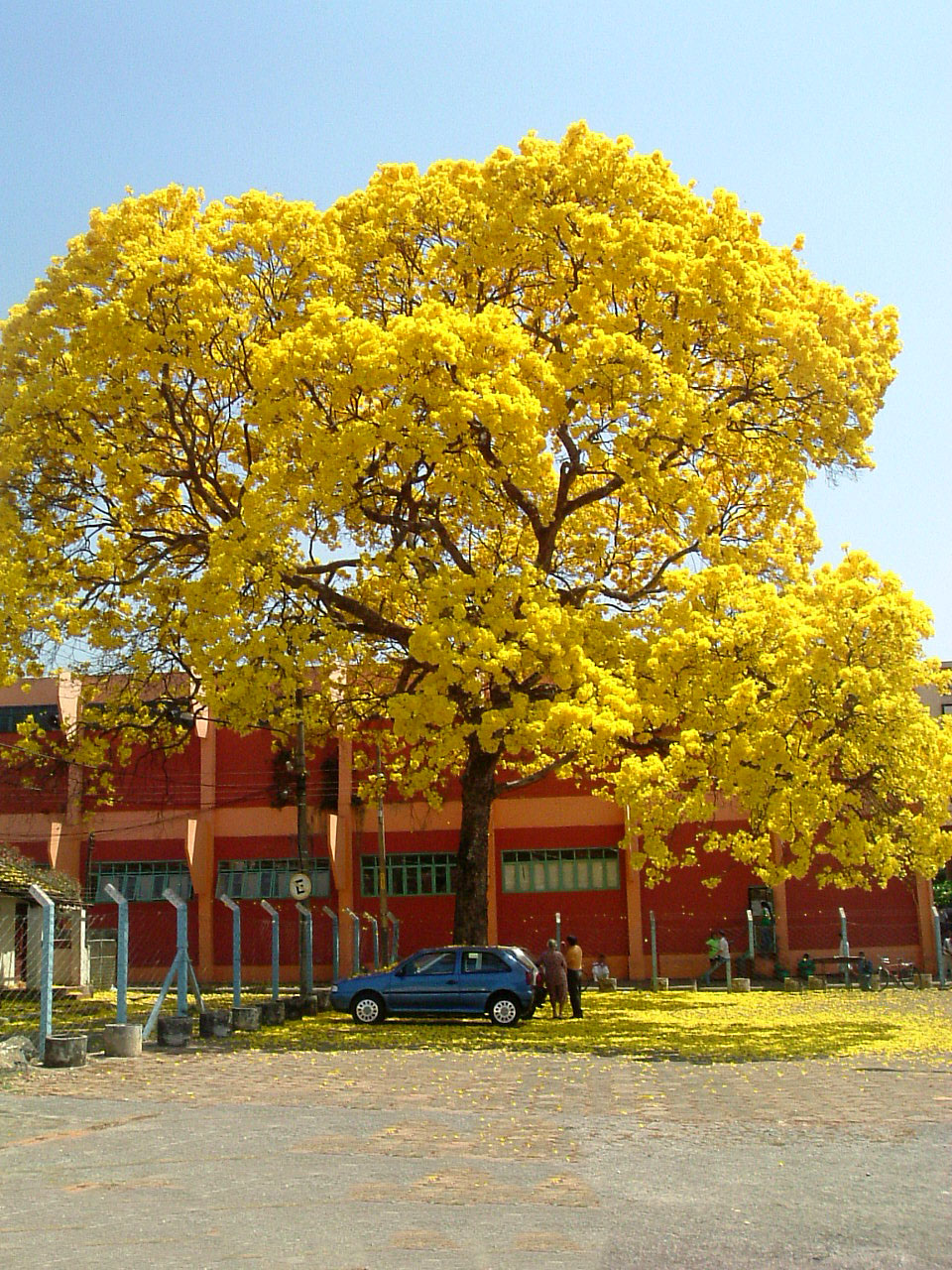 Picture of a Ipê amarelo (Tabebuia) in Goiânia, Goiás, Brazil.